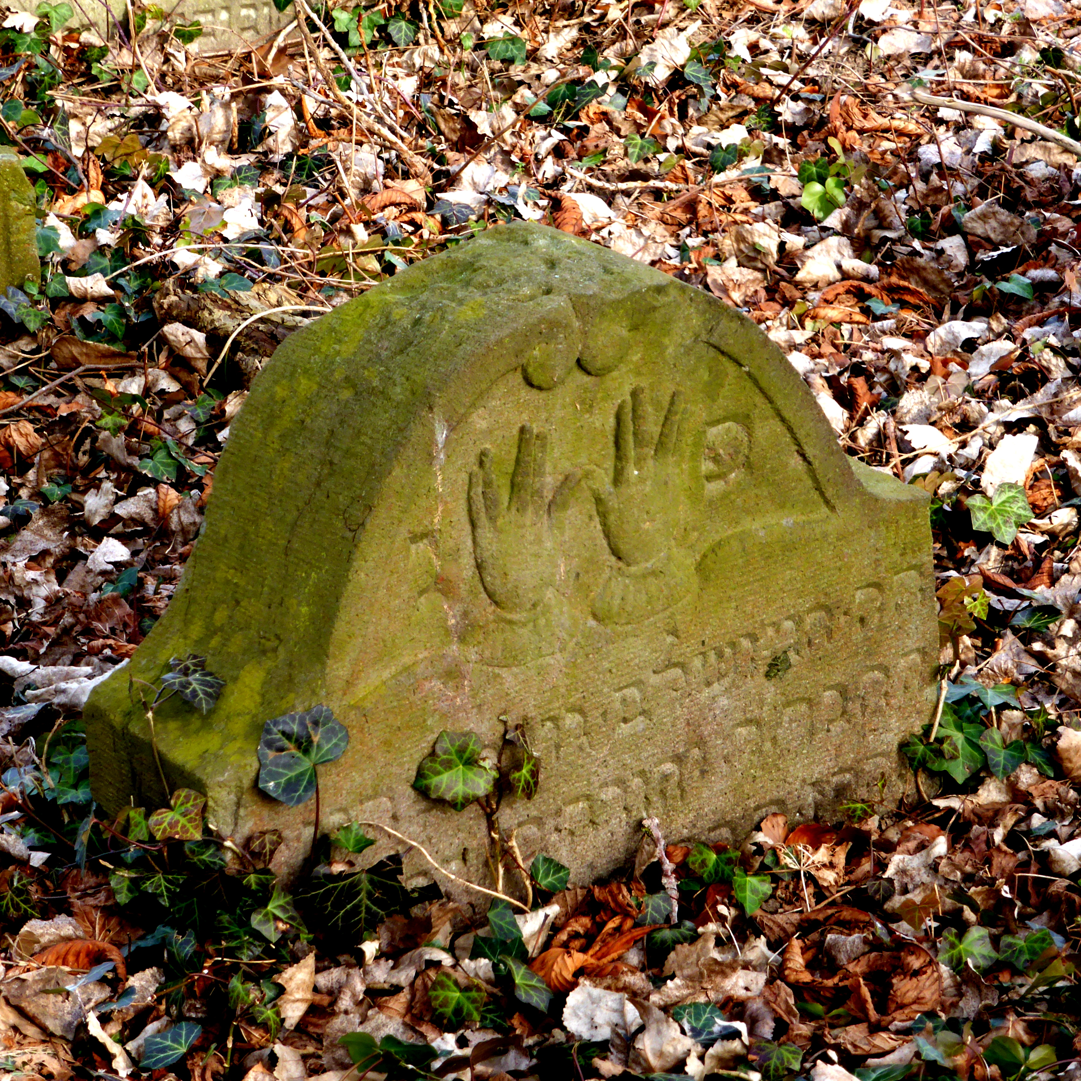 Grabstein mit aaronitischem Segen in Schwarzrheindorf